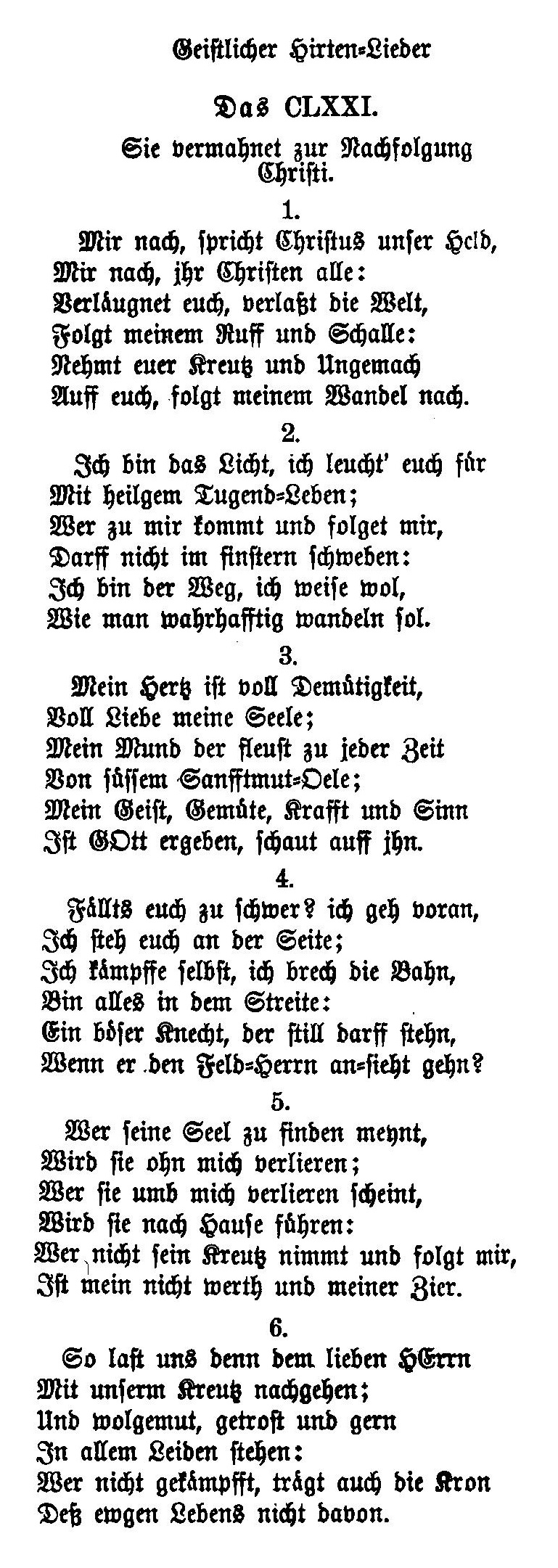 Mir nach, spricht Christus, unser Held, Originaltext aus Heilige Seelen-Lust 1668, Nachdruck Georg Ellinger (Hg.), Halle/S. 1901